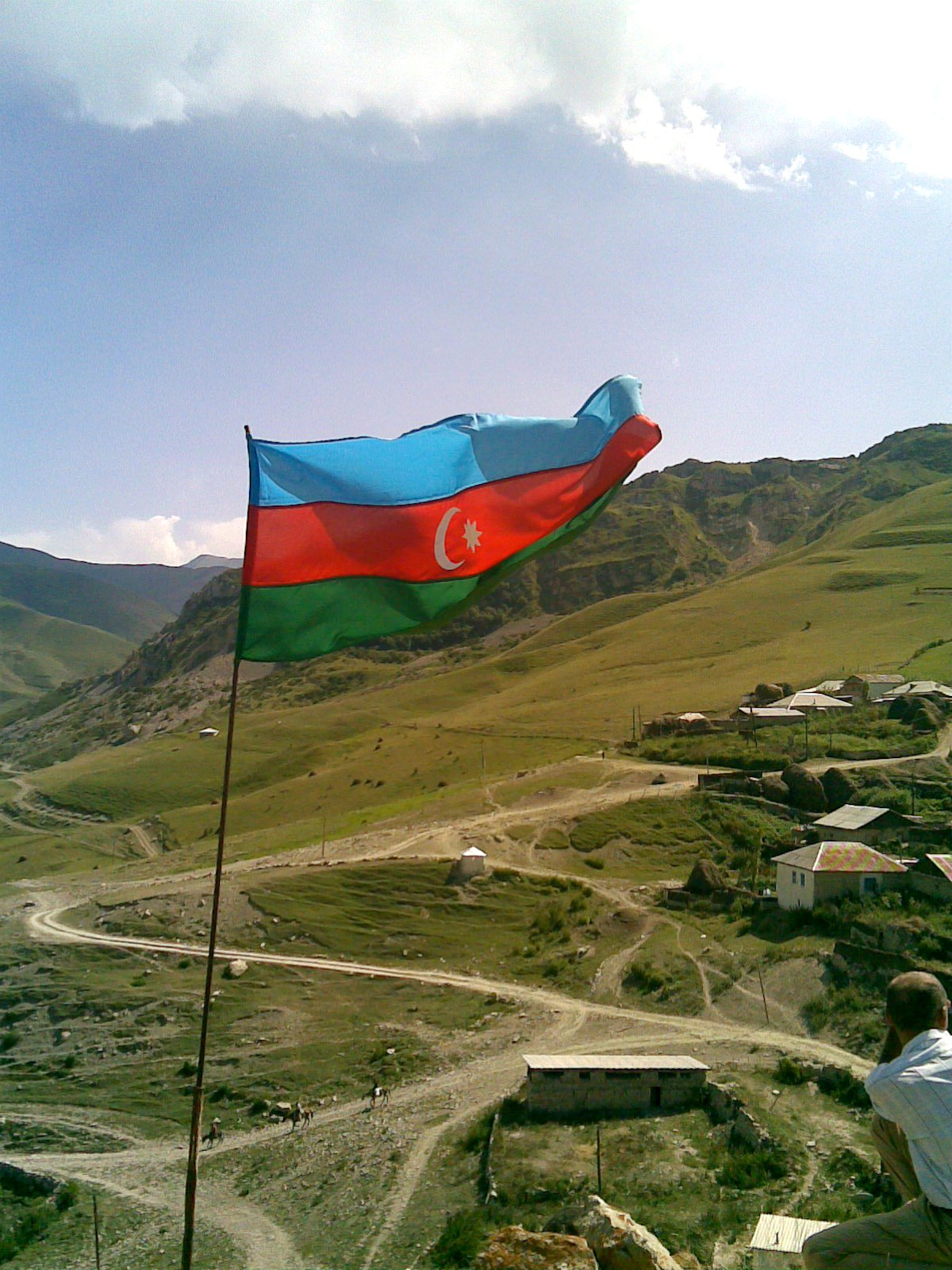 Cek kəndində Azərbaycan bayrağı